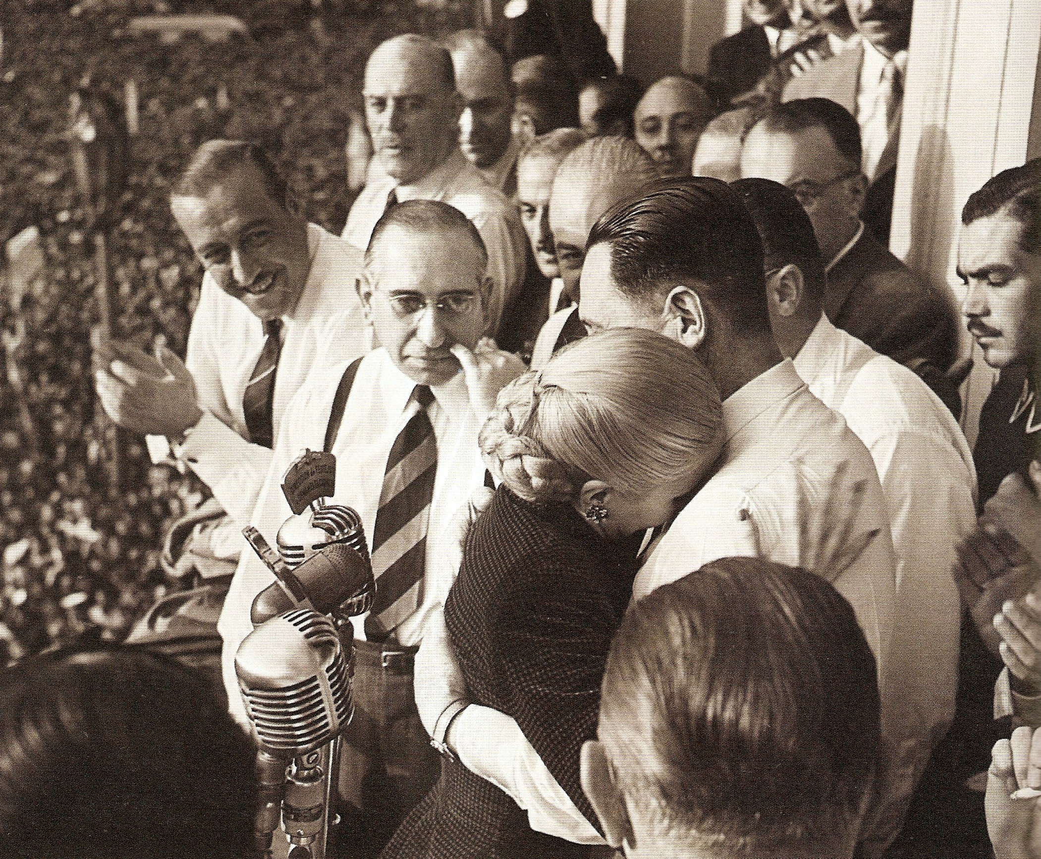 Eva Duarte (Evita) llorando abraza a Perón. Acto 17 de octubre de 1951, en el balcon de la Casa Rosada que da a la Plaza de Mayo. A su izquierda, el ministro Ángel Borlenghi y el diputado Héctor Cámpora. Detrás Juan Duarte. Fuente: "Los últimos días de Eva Perón" (La Nación).